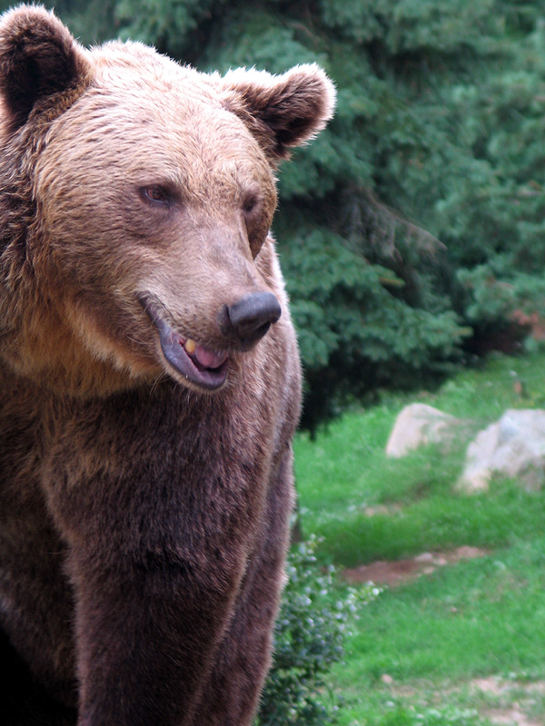 a bear, from the "Parc animalier des Pyrénées"